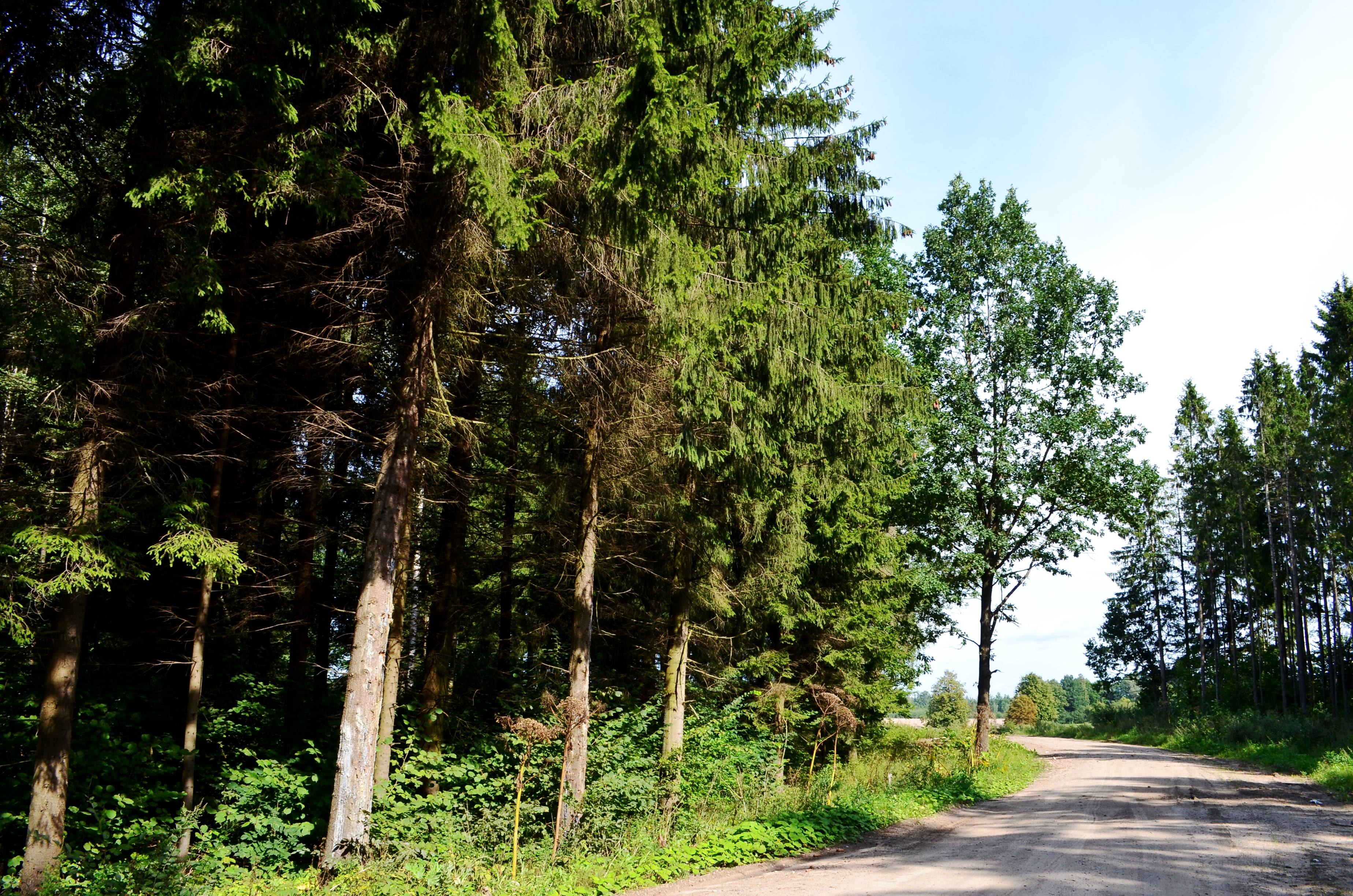 Varnabūdės giria netoli Utalinkos, Kazlų Rūdos sav.